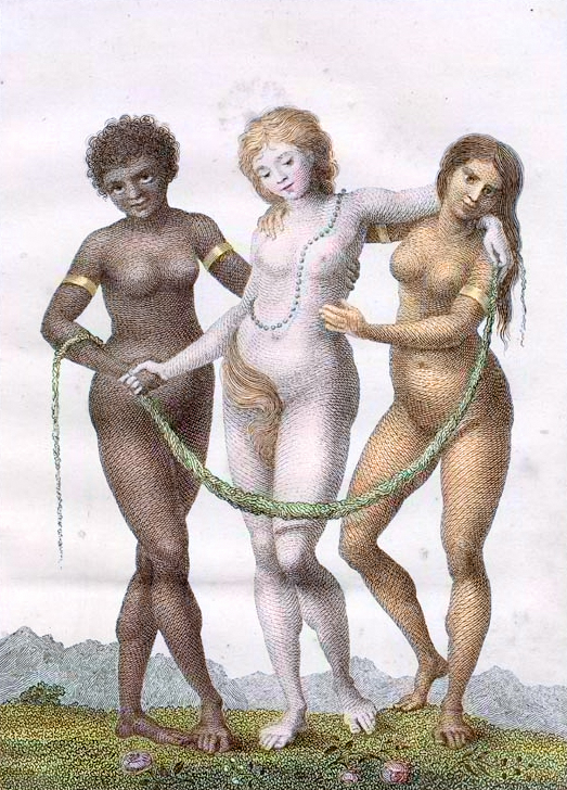 Gravure de William Blake représentant métaphoriquement l'Europe soutenue par l'Afrique et l'Amérique